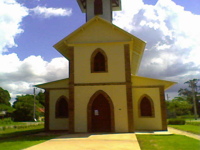 L'église Saint-Jean Baptiste vers 16H50.